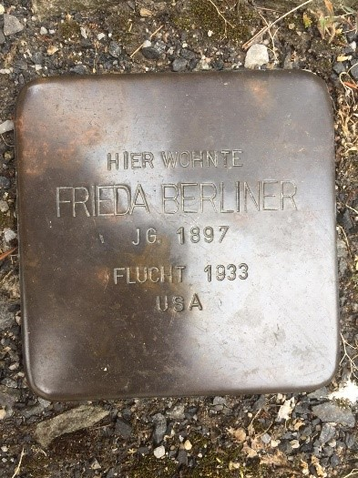 Stolpersteine